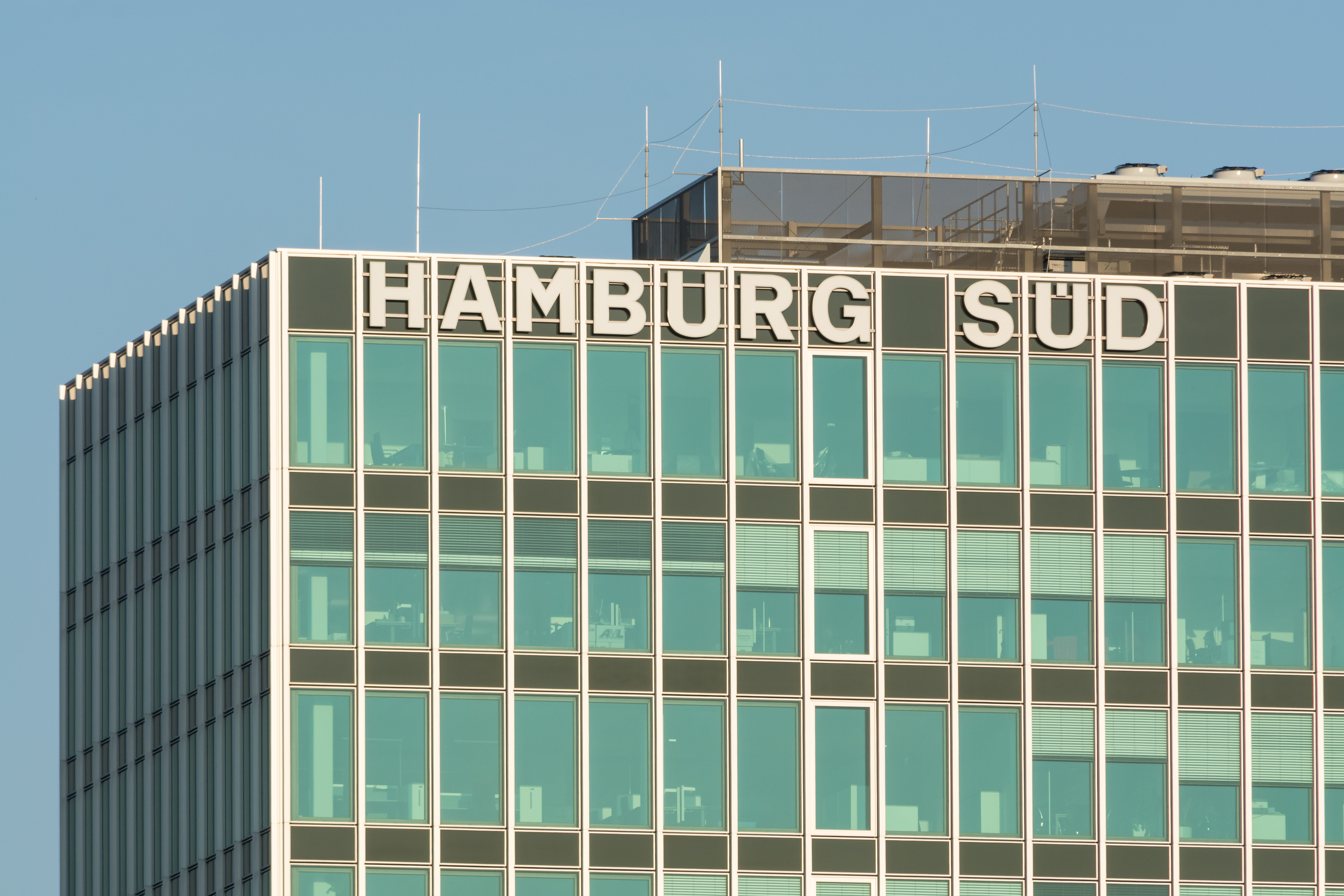 Fassadendetail des Gebäudes der Reederei Hamburg Süd in Hamburg-Altstadt. This is a photograph of an architectural monument.